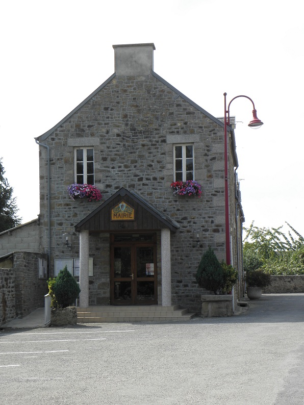 Mairie de Poilley (50).